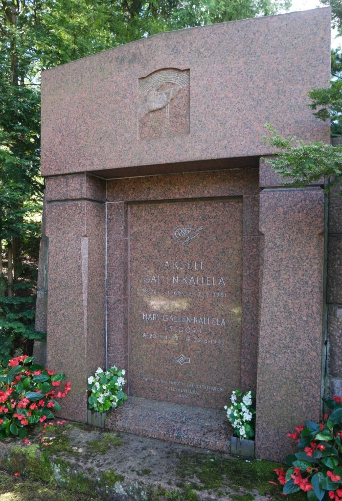 Grabmal des Malers, Architekten und Designers Akseli Gallen-Kallela (1865-1931) auf dem Friedhof Hietaniemi in Helsinki